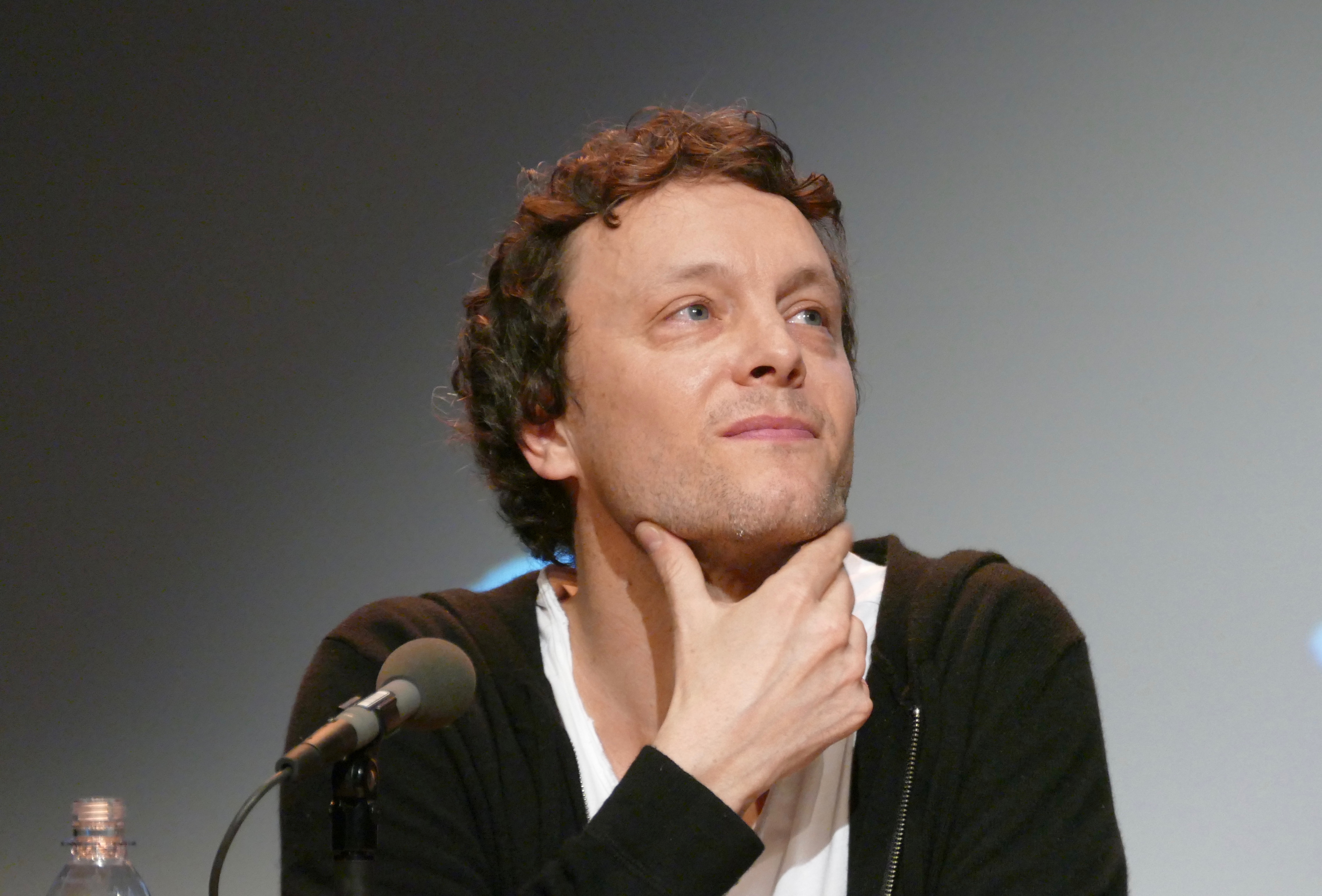 Thomas Klupp las bei den Wortspielen 2019 in München aus seinem Roman "Wie ich fälschte, log und Gutes tat" und erhielt an diesem Abend den "Publikumspreis".